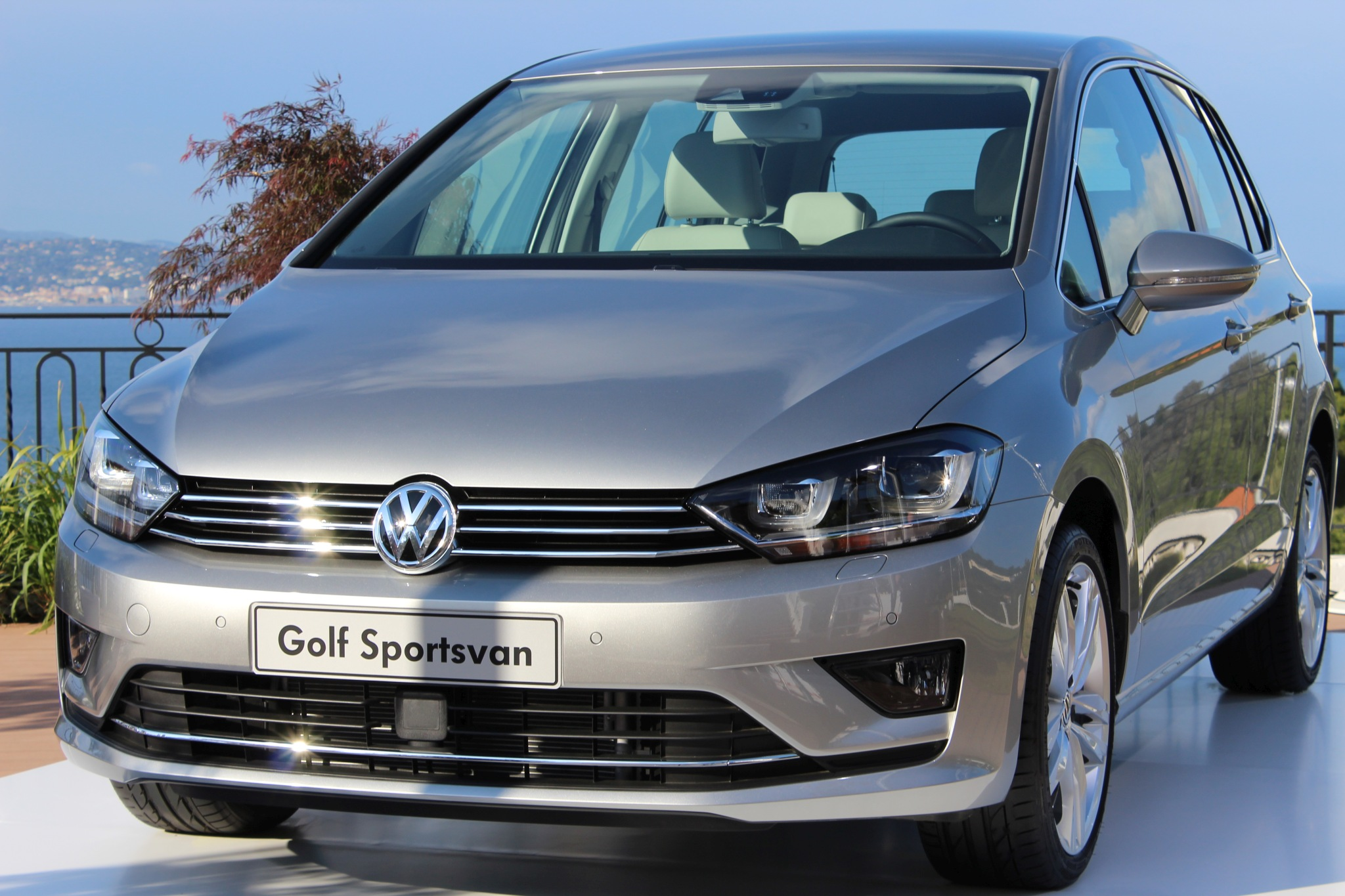 der Nachfolger des Golf Plus Basisplattform: Golf 7 Jahr: 2014